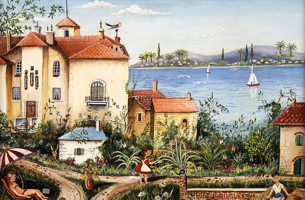 Vacances à Saint Raphaël du peintre français Raphaël Toussaint. Cette œuvre est une H.S.T 16x24.